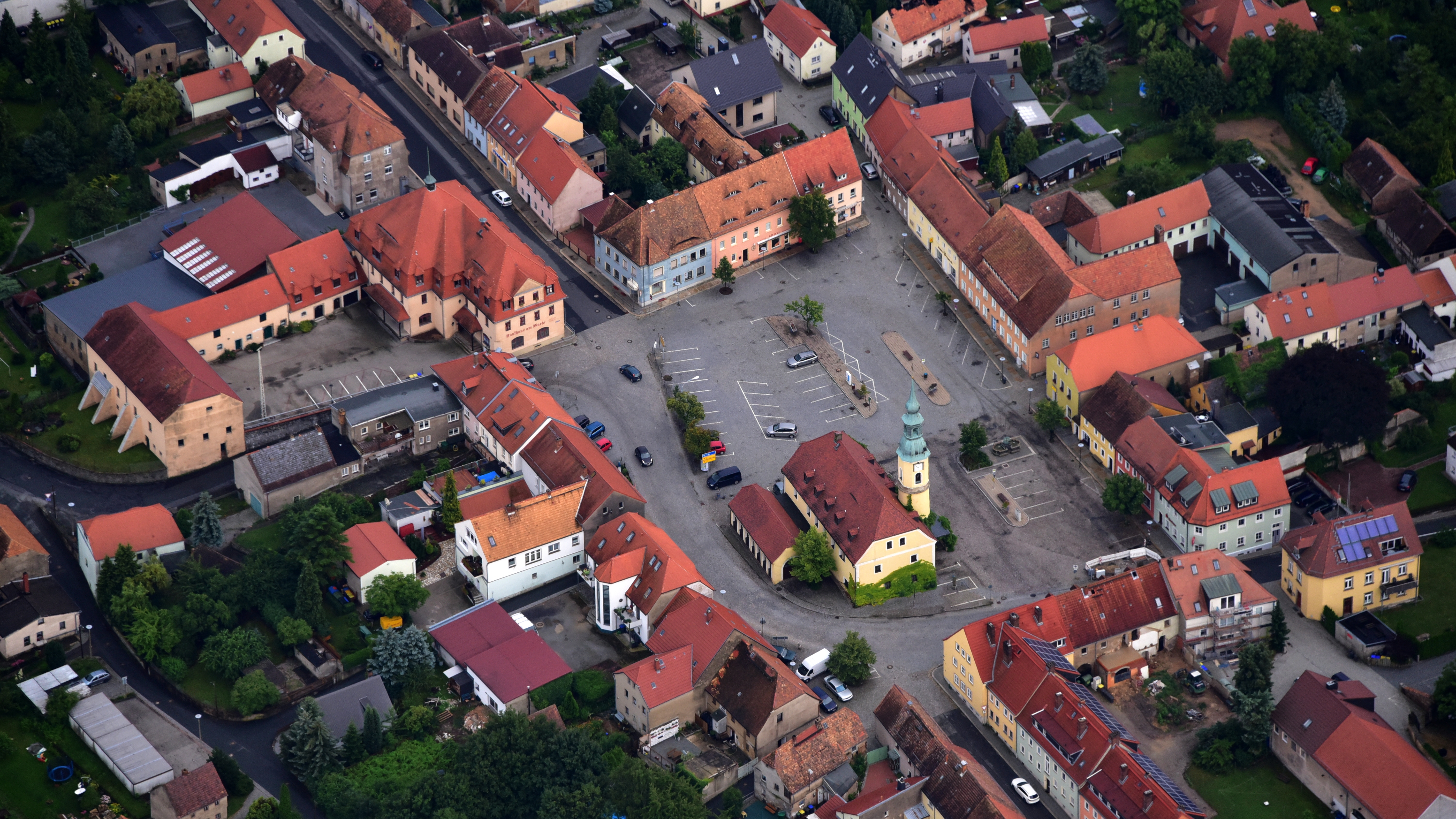 Weißenberg Zentrum, Luftaufnahme (2017) Hornjoserbsce: Powětrowy wobraz Wósporka (2017)